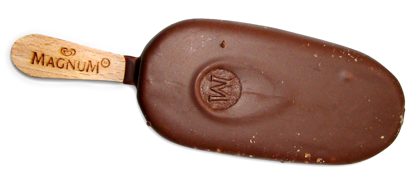 Magnum (ice cream)